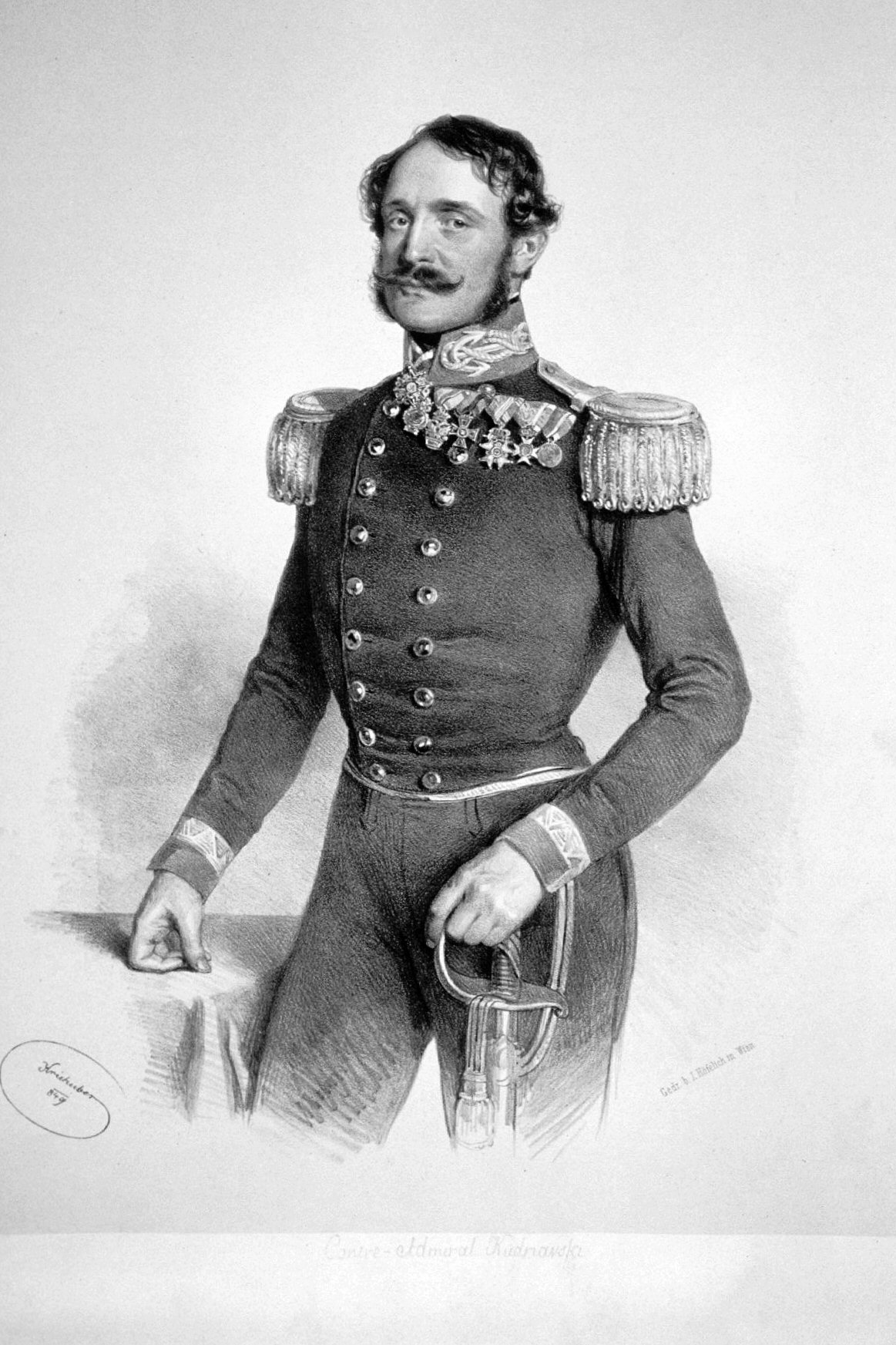 Ludwig Freiherr von Kudriaffsky (1805-1894), Marineoffizier, Feldmarschalleutnant, Diplomat, Geheimrat. Lithographie von Josef Kriehuber, 1849